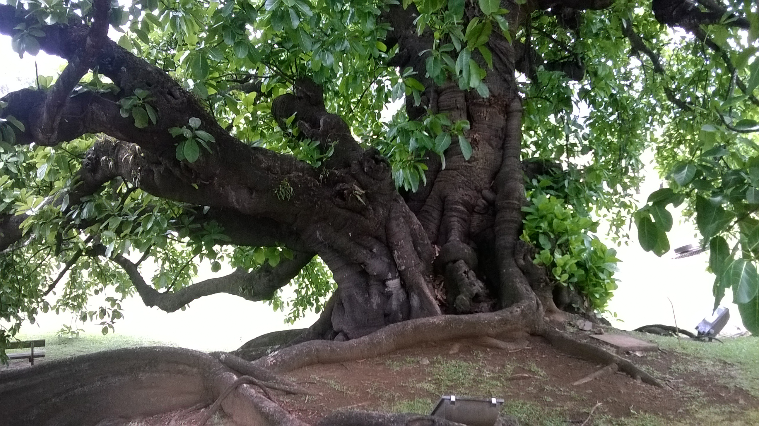 Figuier maudit, Ficus obtusifolia, planté dans le parc de l' Habitation Clément en Martinique.